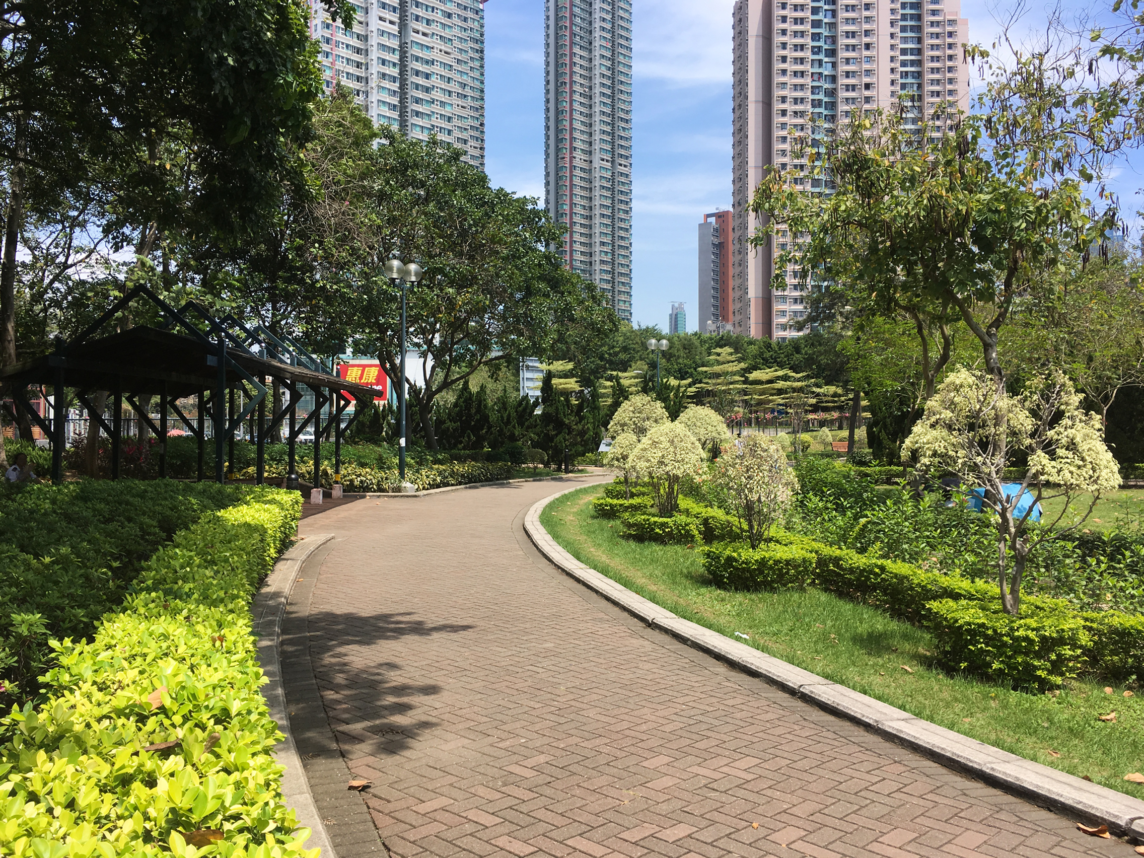 Nam Cheong Park